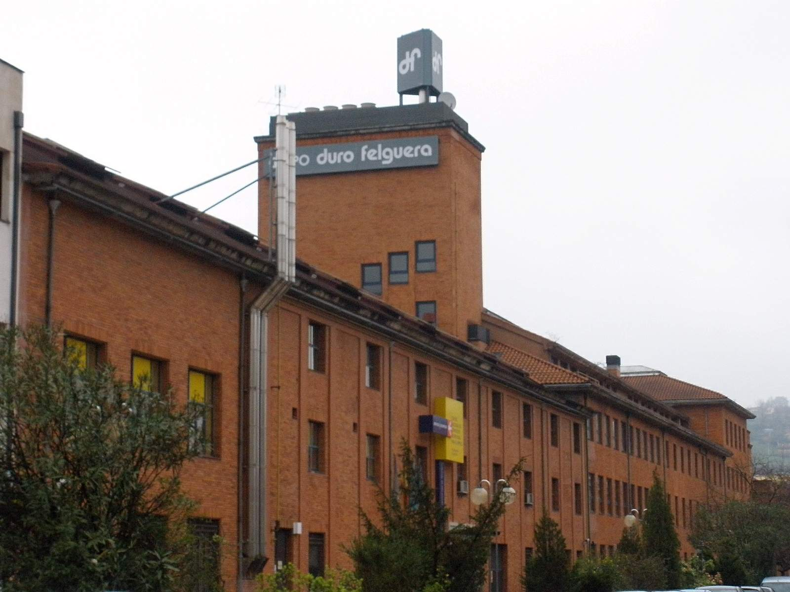 La Felguera de Langreo (Asturias)